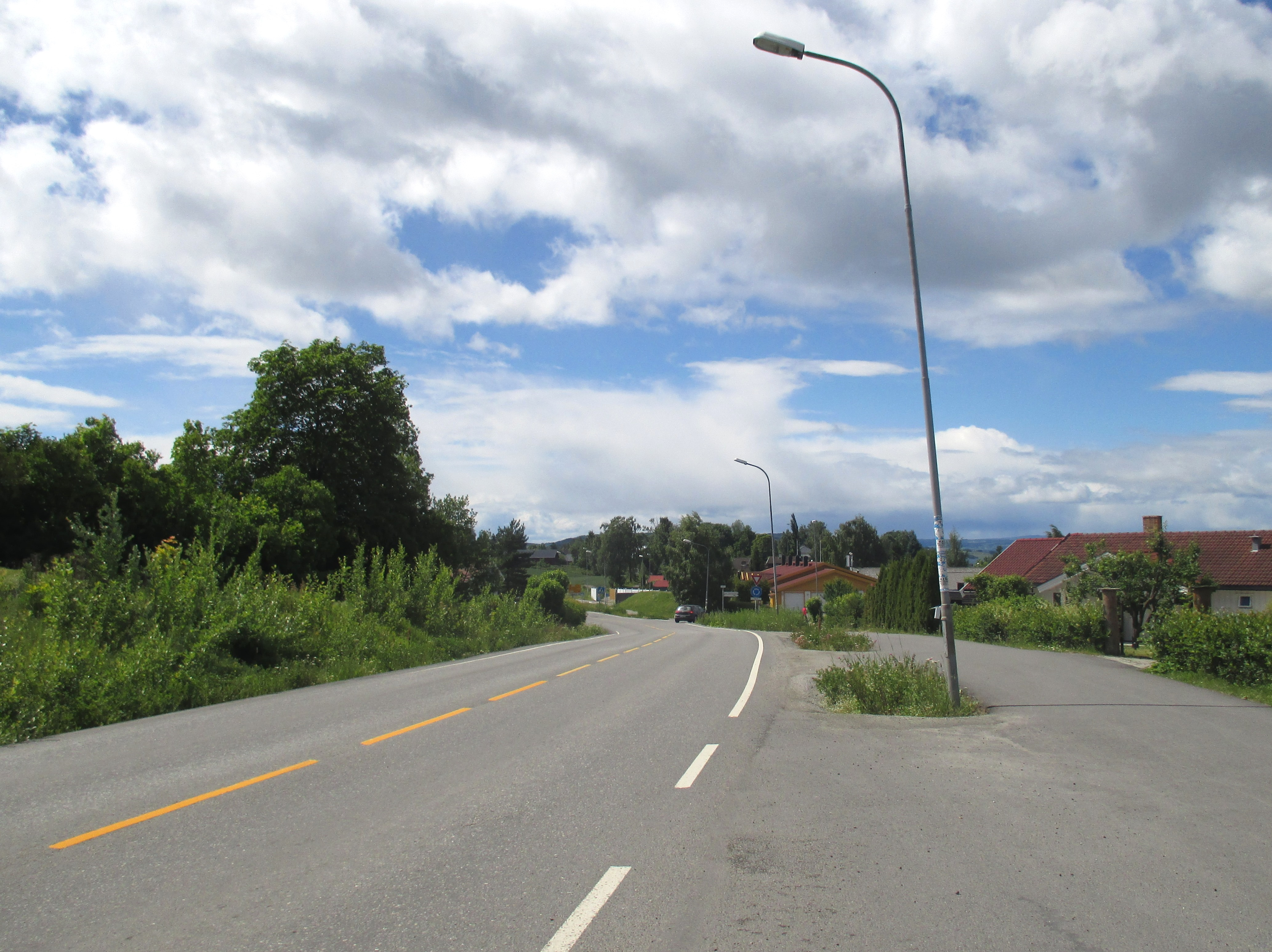 Kjonerudvegen (FV1854, tidl. FV192) på Bekkelaget